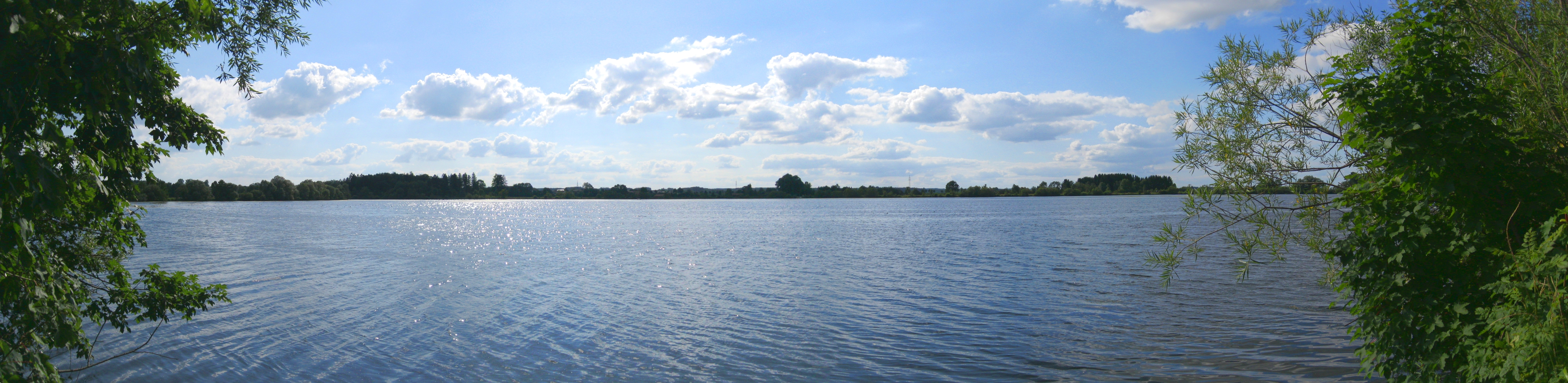 Am Ostufer des Frankenhofner Sees